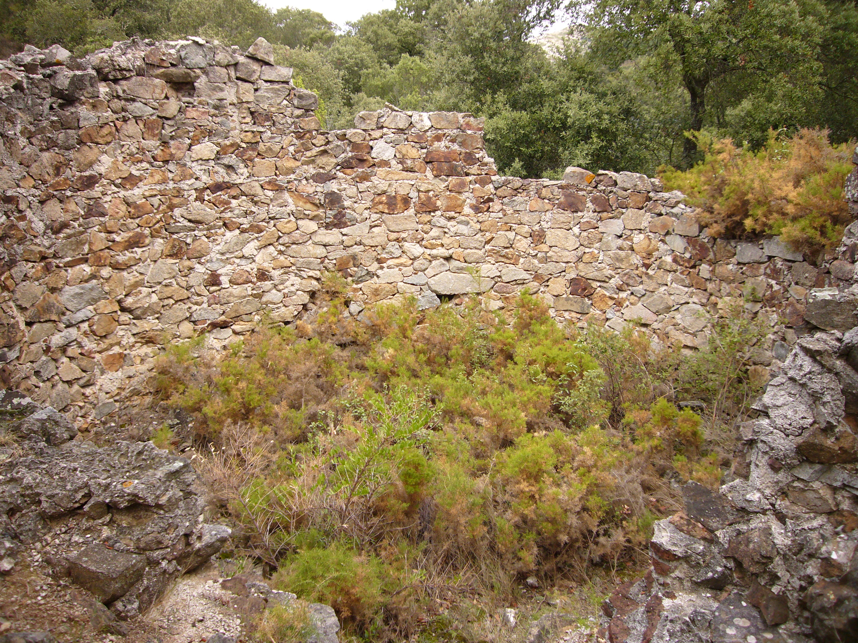 Puits à glace, près de Bélesta, Pyrénées-Orientales, France